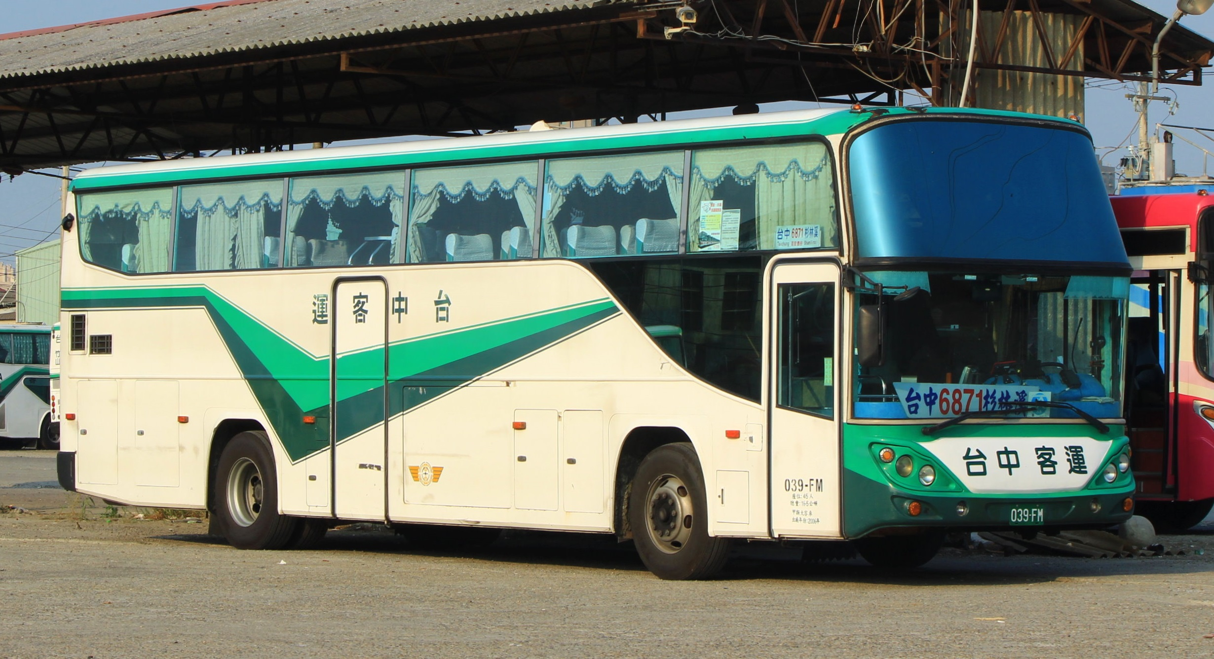 中文（台灣）: 台中客運2006年日野LRM2PSU大客車039-FM。